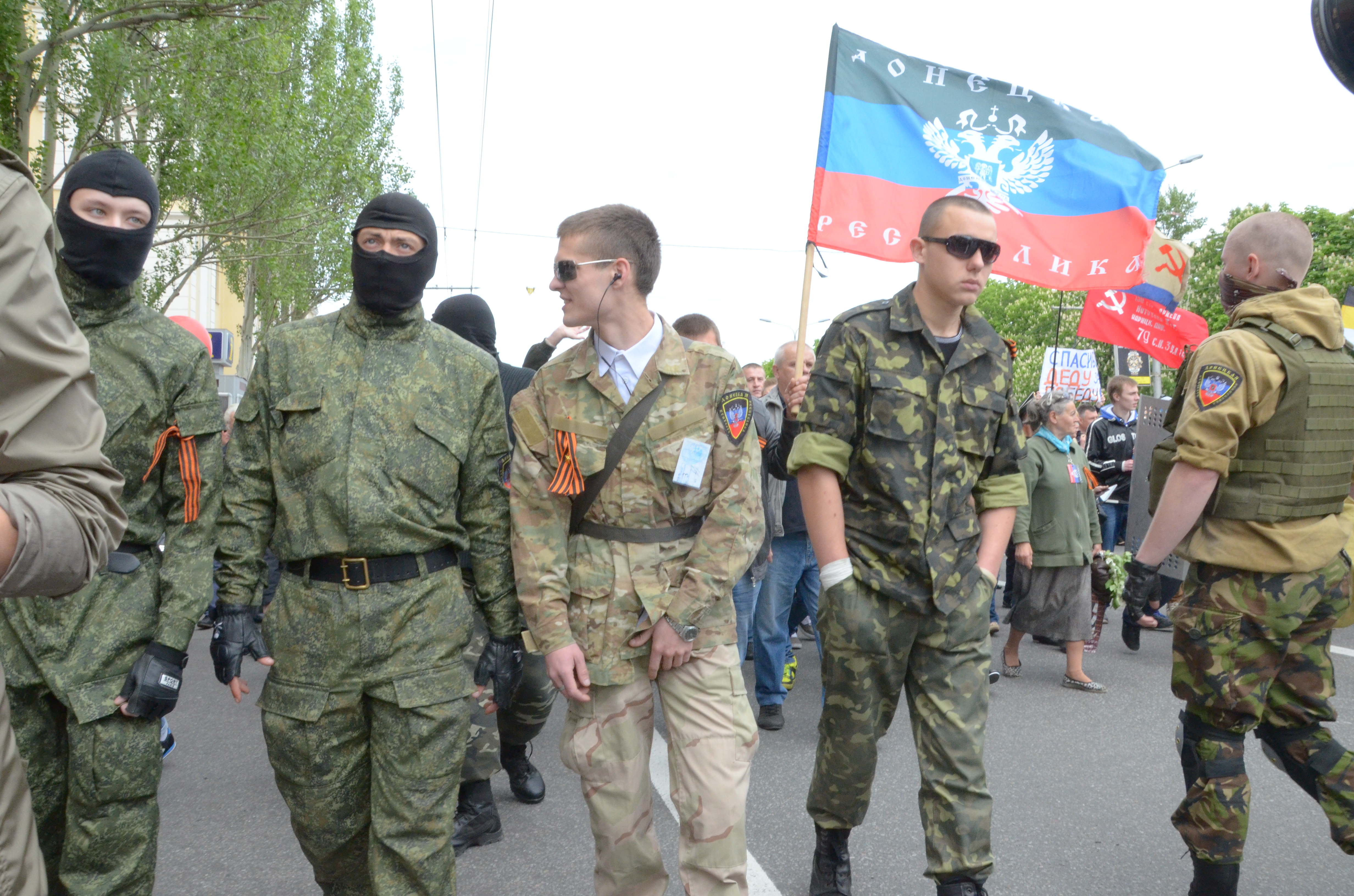 День Победы в Донецке